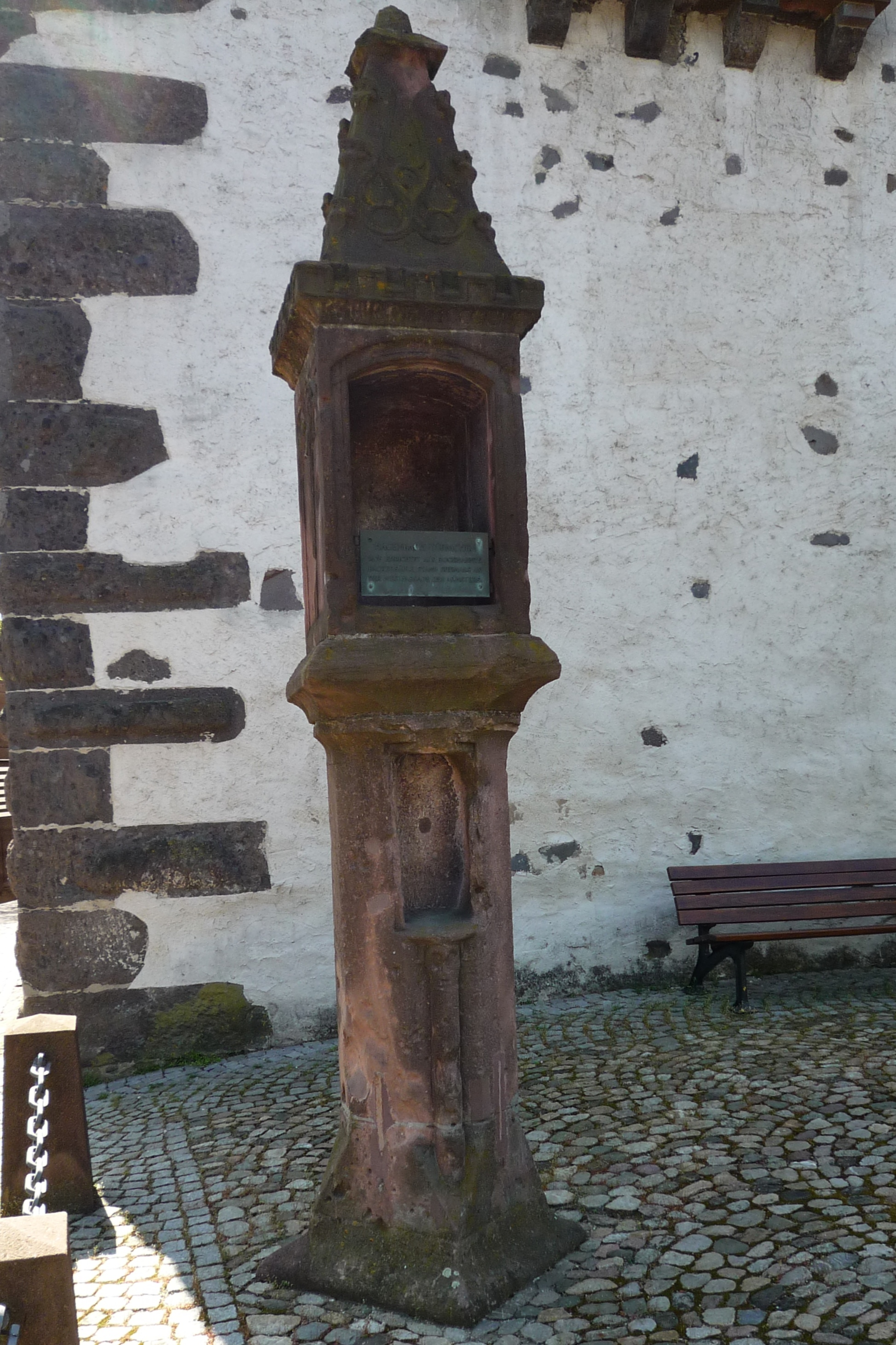 Das 1476 als Bäckersäule errichtete Hagenbach-Türmchen beim Radbrunnen in Breisach stand früher an der Westfassade des Münsters